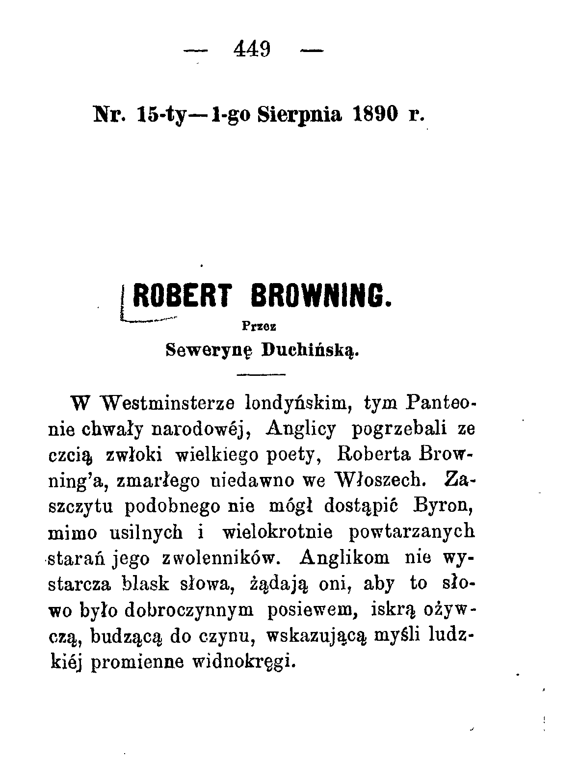 artykuł "Robert Browning" Kronika Rodzinna. Pismo dwutygodniowe 1890 nr15